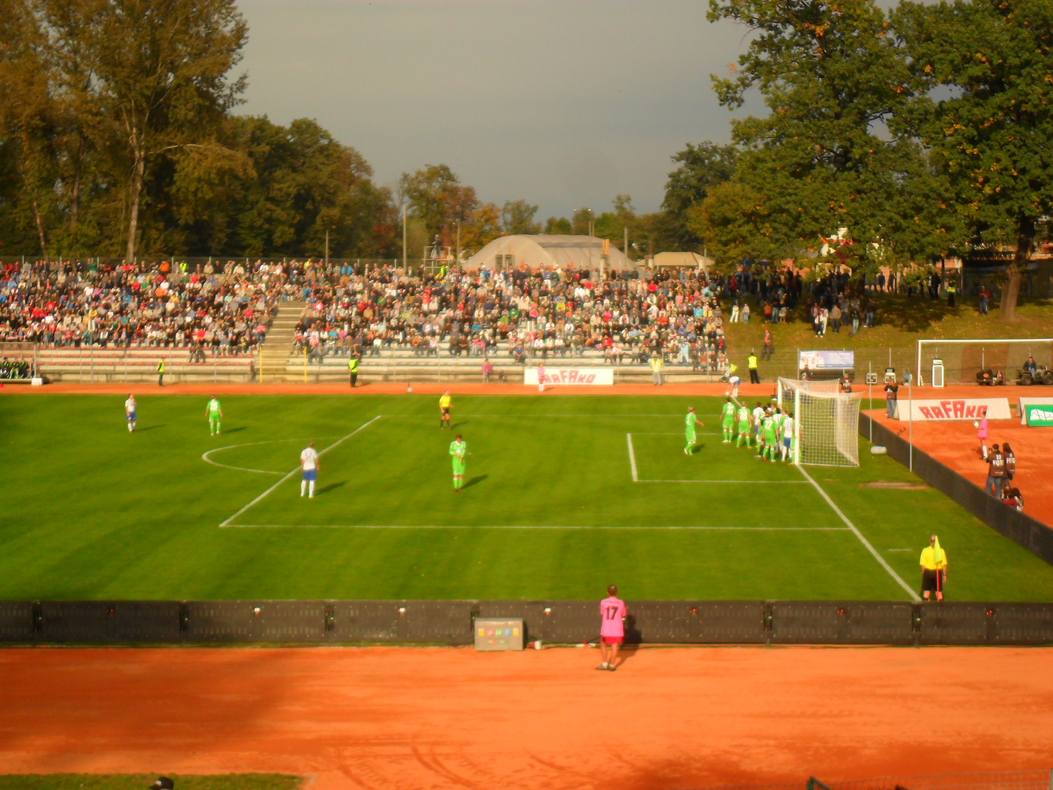 Pierwszy mecz 1/16 finału Ligi Mistrzów UEFA kobiet w sezonie 2012/2013 rozegrany 27 września 2012 roku na stadionie OSiR-u w Raciborzu pomiędzy RTP Unią Racibórz, a niemieckim VfL Wolfsburg, przegrany przez Unię 1:5. Spotkaniem tym ustanowiono nowy rekord frekwencji na meczu piłki nożnej kobiet w Polsce (5125 widzów).